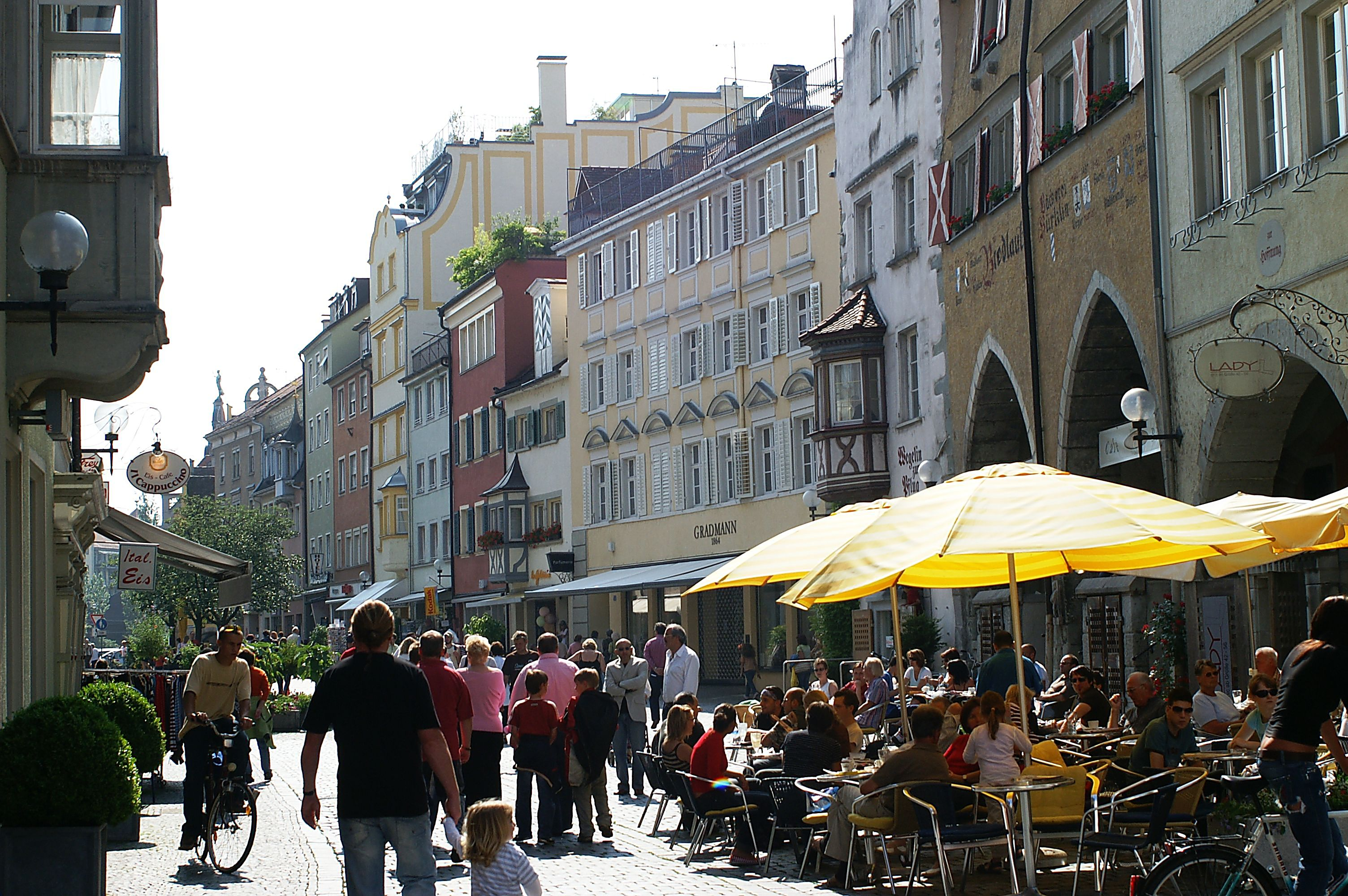 Lindau (Bodensee)